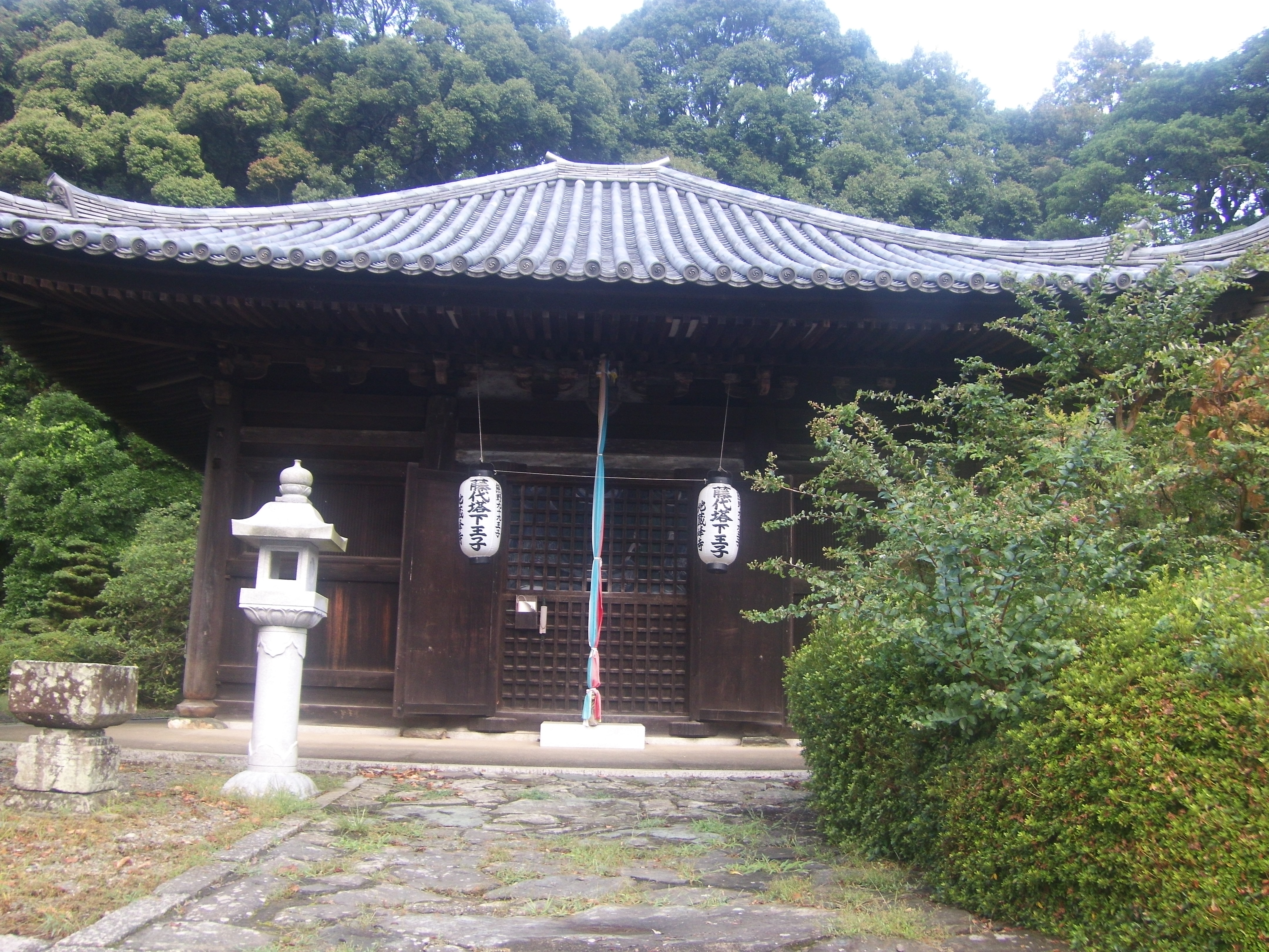 熊野古道・紀伊路の九十九王子の一つ藤白塔下王子を祀る地蔵峰寺（和歌山県海南市）